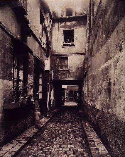 Le 28 rue Broca (Paris), par Atget (vers 1919-1920)